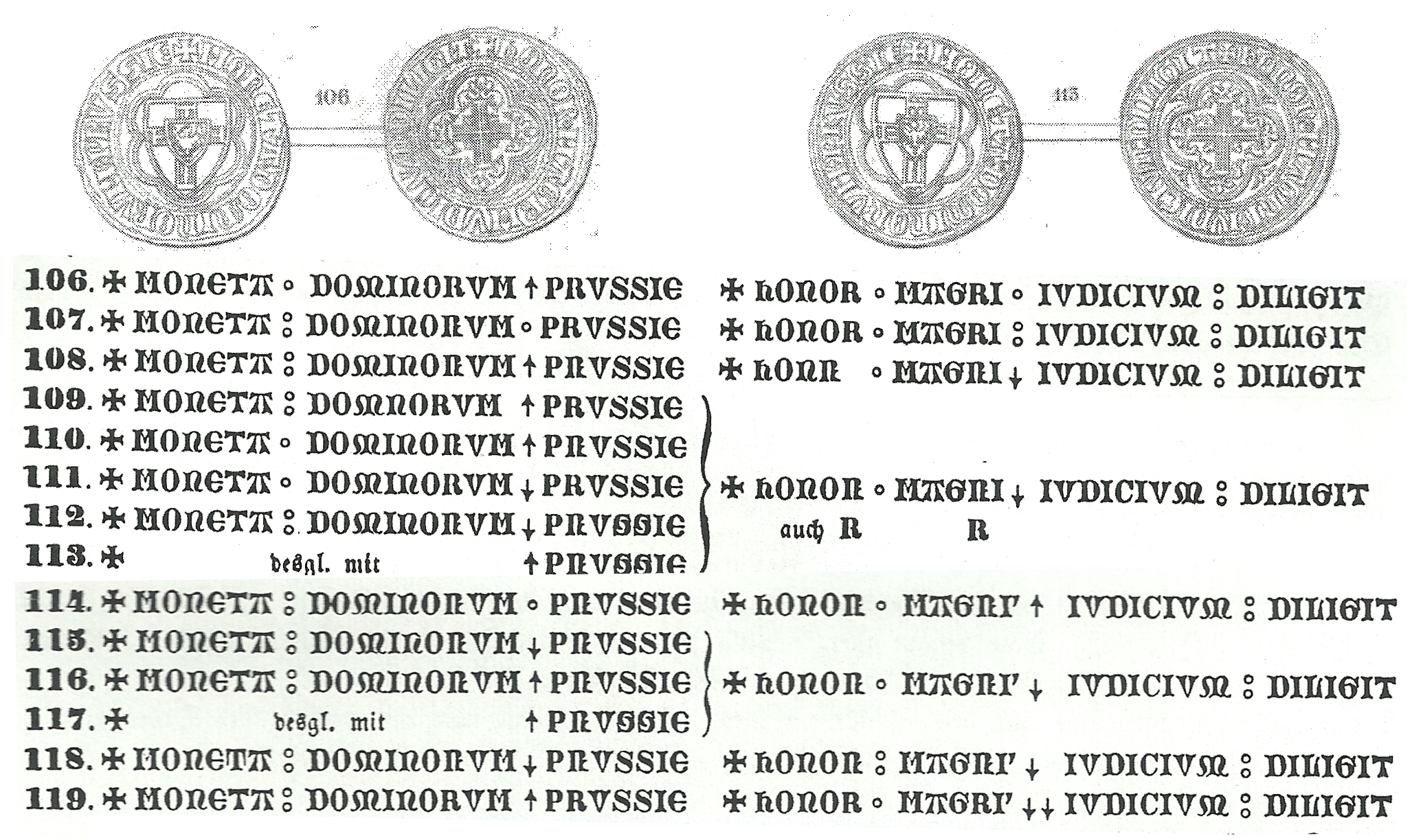 Monety_krzyżackie_1331-1382_a.